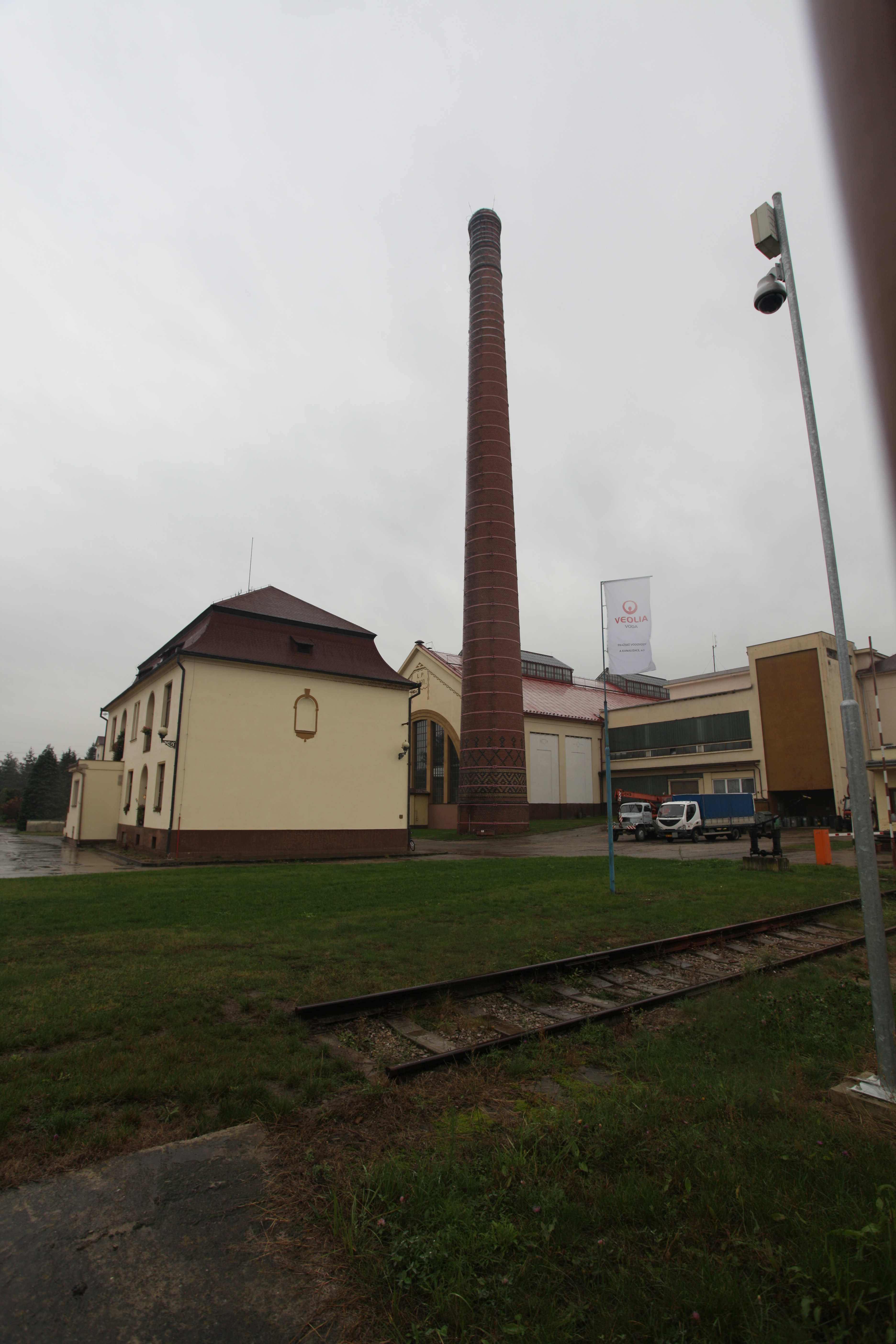 Pohled na úpravnu vod v Káraném. Vlevo administrativní budova, vpravo komín a další součástí ÚV. Komín byl používán až do roku 1936, kdy došlo k náhradě parních pístových čerpadel za odstředivá elektrická. Objekt úpravny vod v Káraném je dílem architekta Čeňka Gregora a byl realizován v letech 1908-1914. Zdroje: Křivánek, Oldřich a Kněžek, Miroslav. 2001. Zdroje pitné vody v Káraném. Principy získávání vody v oblasti káranské vodárny. Pražské vodovody a kanalizace a.s.